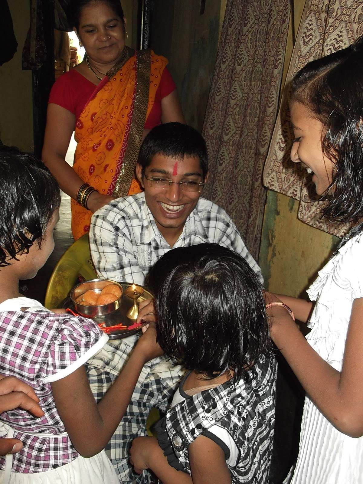 भारत में रक्षाबंधन पर्व भाई बहन के पवित्र रिश्तों का प्रतीक है।